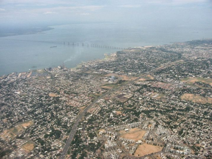 In eigen beheer gemaakt, daarna bewerkt (om de heiigheid eruit te halen)